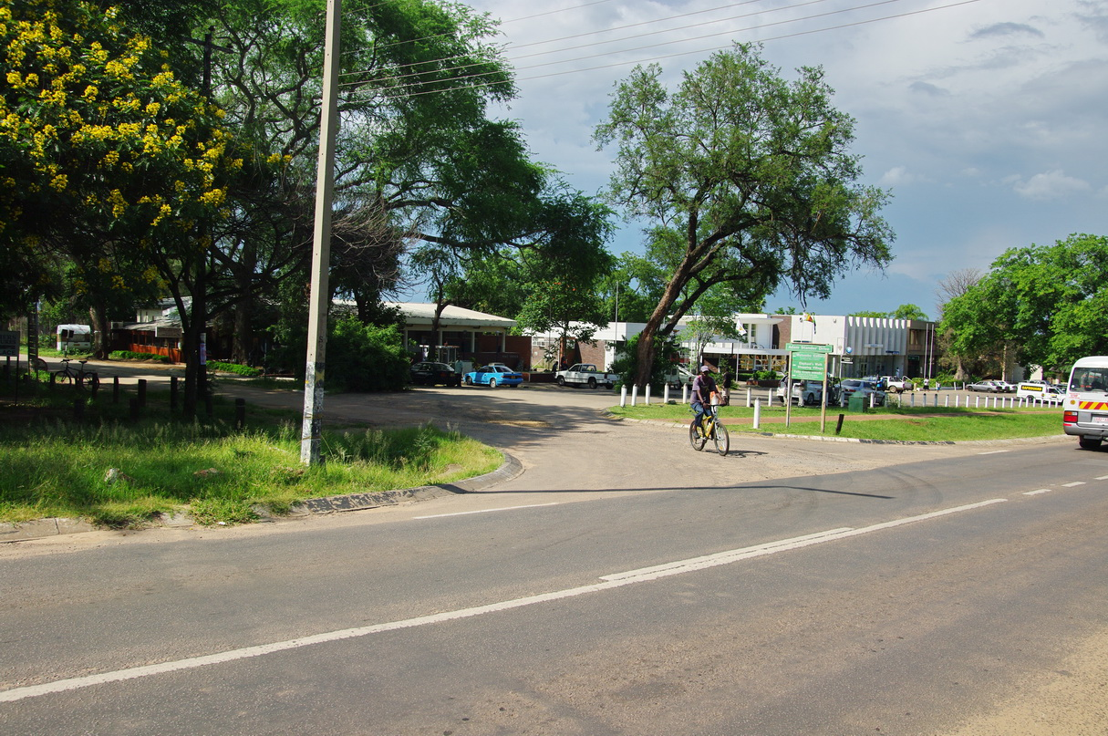 Straße in Victoria Falls